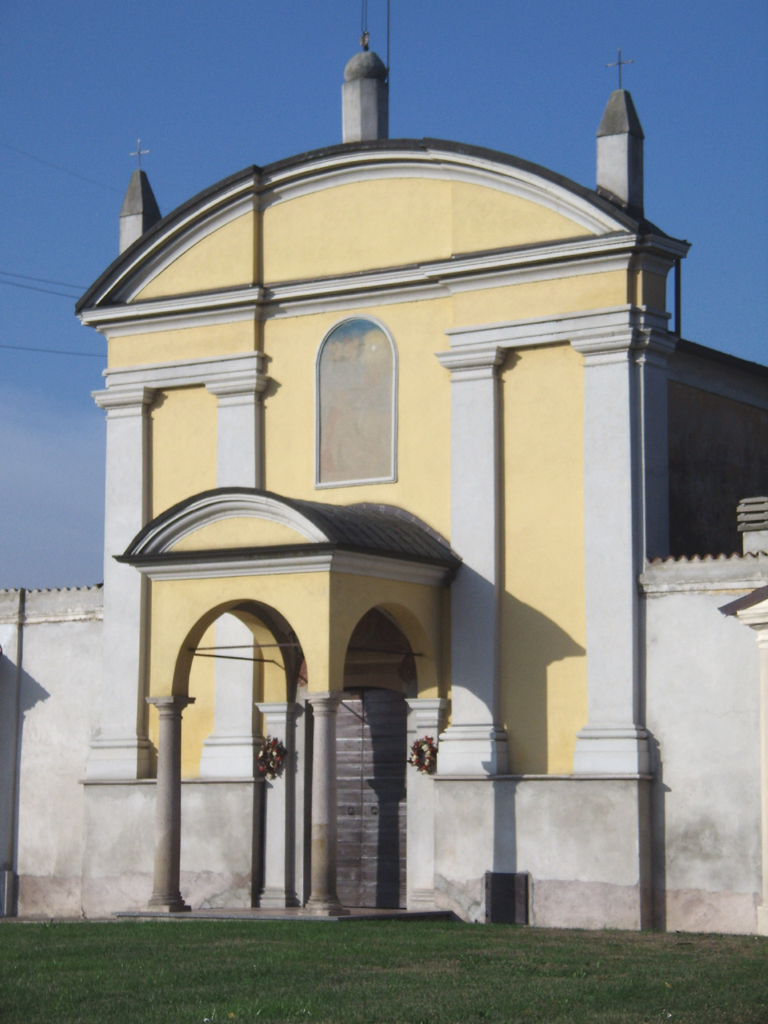 La chiesa di San Callisto Papa e Martire a Cornegliano Laudense